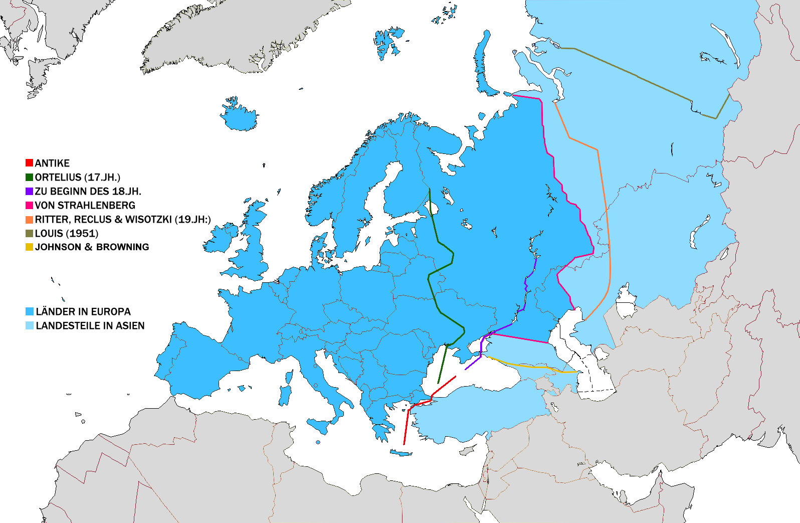 Europas geografische Grenzen nach unterschiedlichen Definitionen: Antike Abraham Ortelius (1527−1598) 18. Jahrhundert Philip Johan von Strahlenberg (1676−1747) - Ural als Grenze Carl Ritter (1779−1859), Reclus & Wisotzki Herbert Louis (1900−1985)